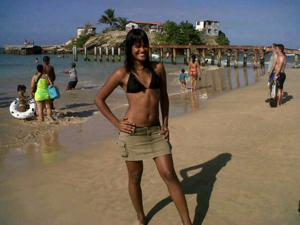 Playa caracolito, estado Miranda Venezuela (2008)